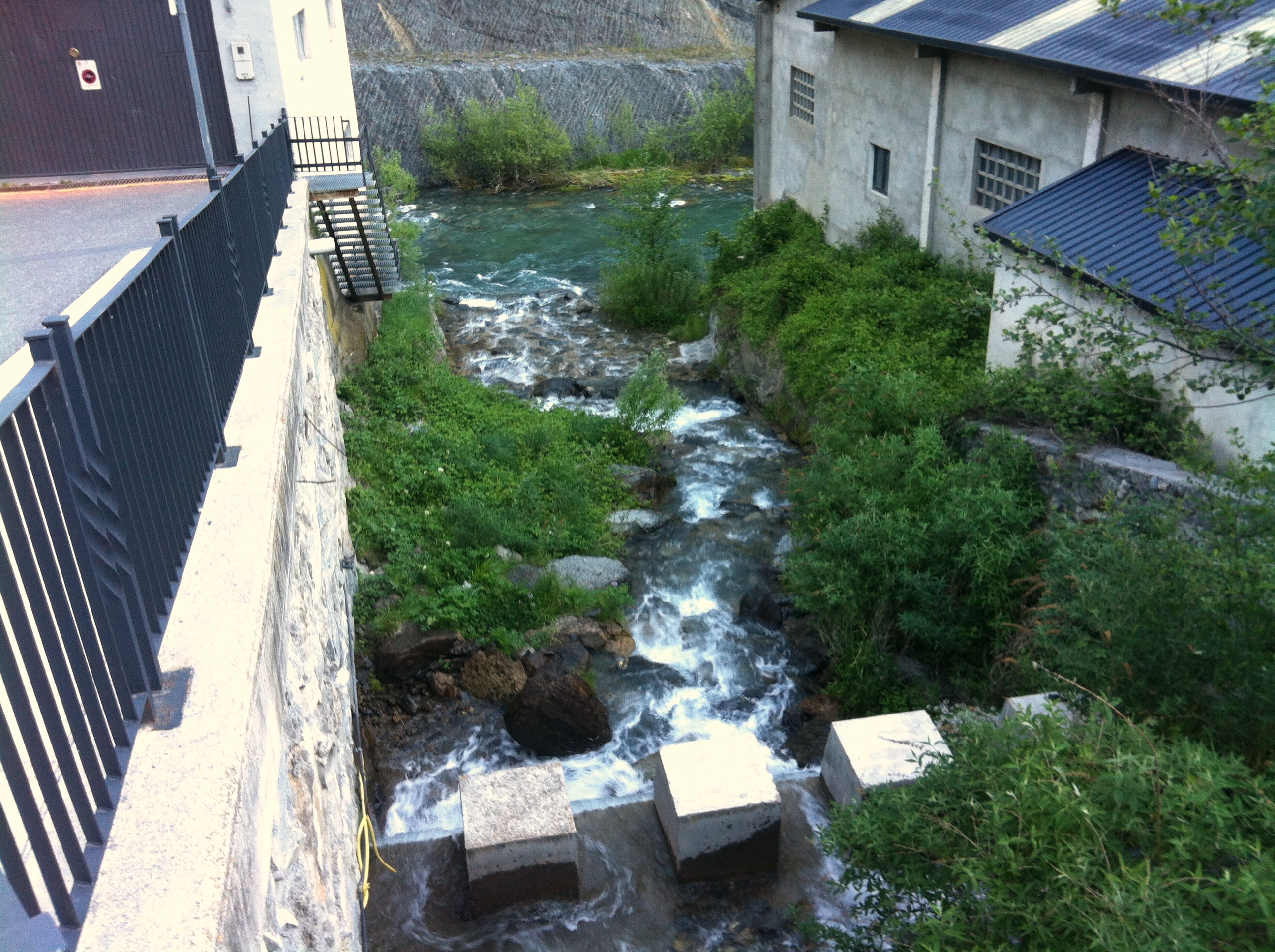 Riu d'Aubinyà This is a a photo of a river in Andorra with id: IEA-R-6